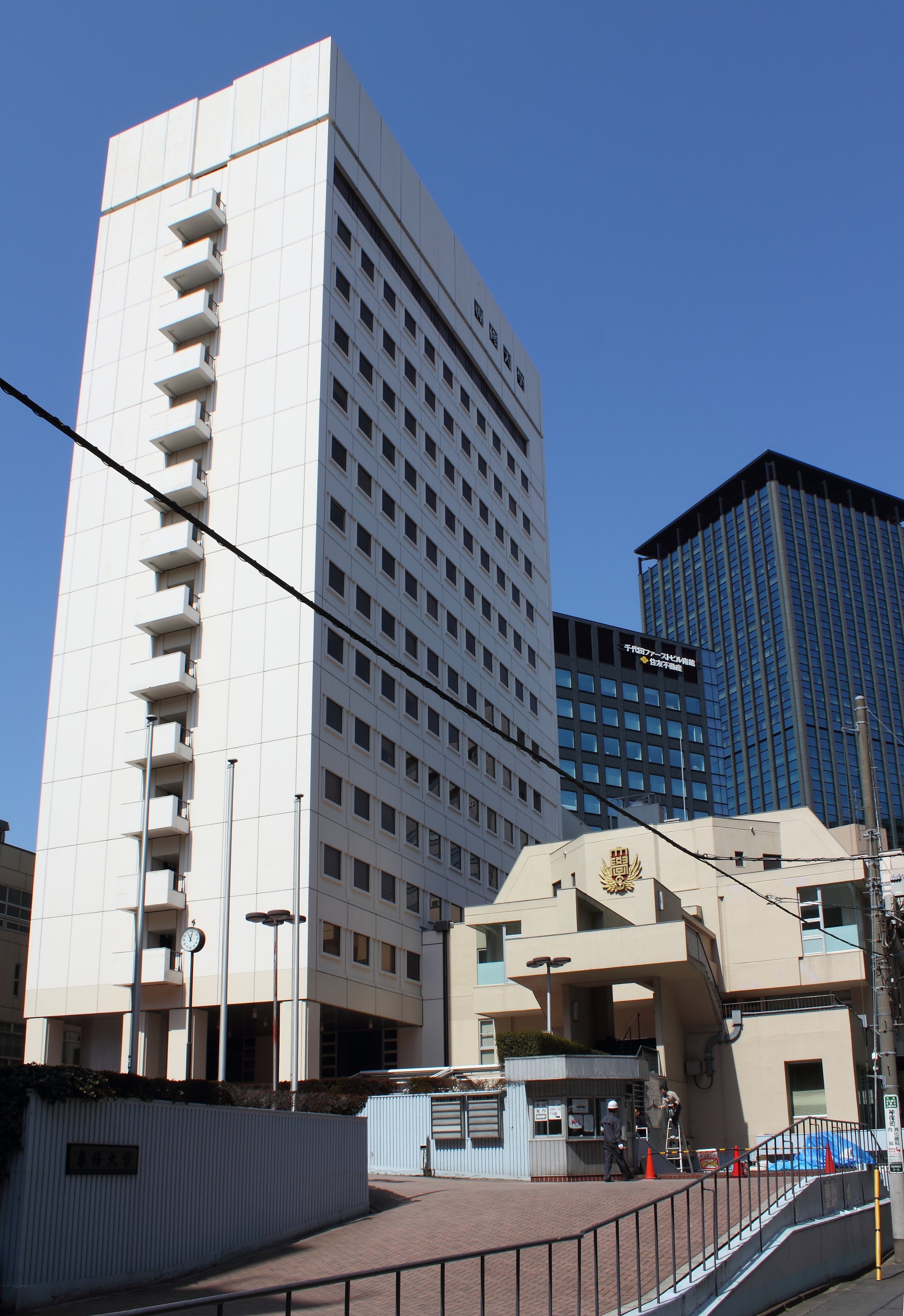 専修大学神田校舎